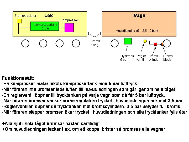 Tågbromssystem